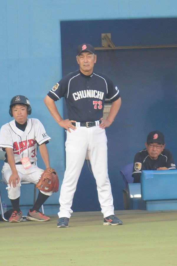 中日ドラゴンズ、宇野勝コーチ。こまちスタジアムで。